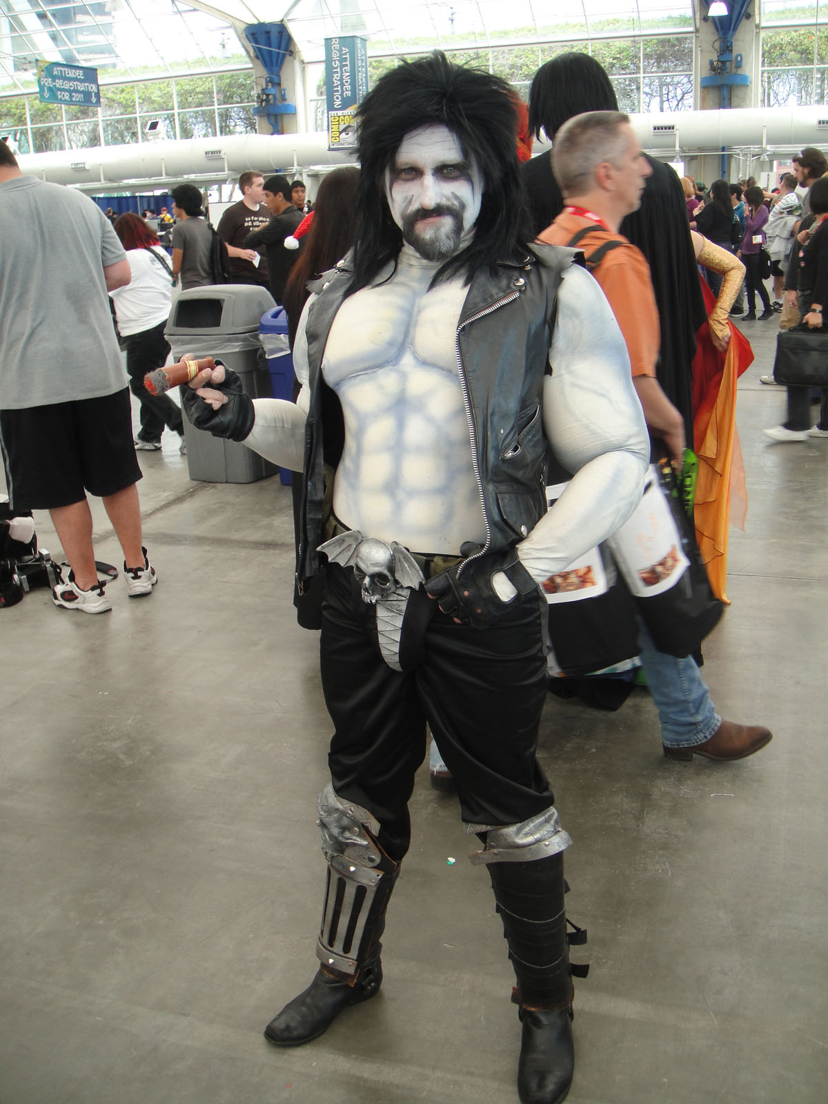 Comic-Con 2010 - Lobo costume